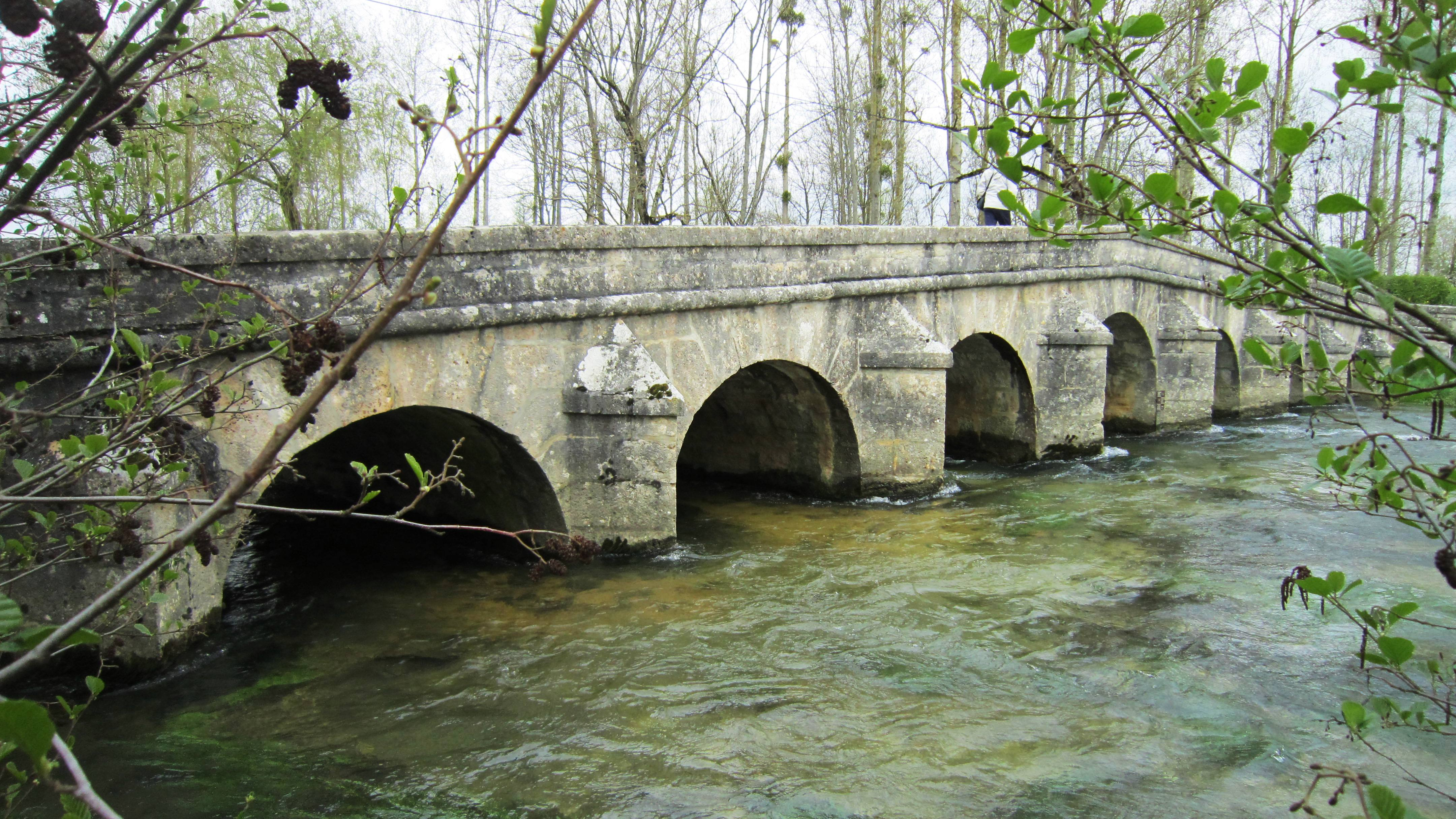 Pont de l'Abattoir de Montigny-sur-Aube (Côte-d'Or)